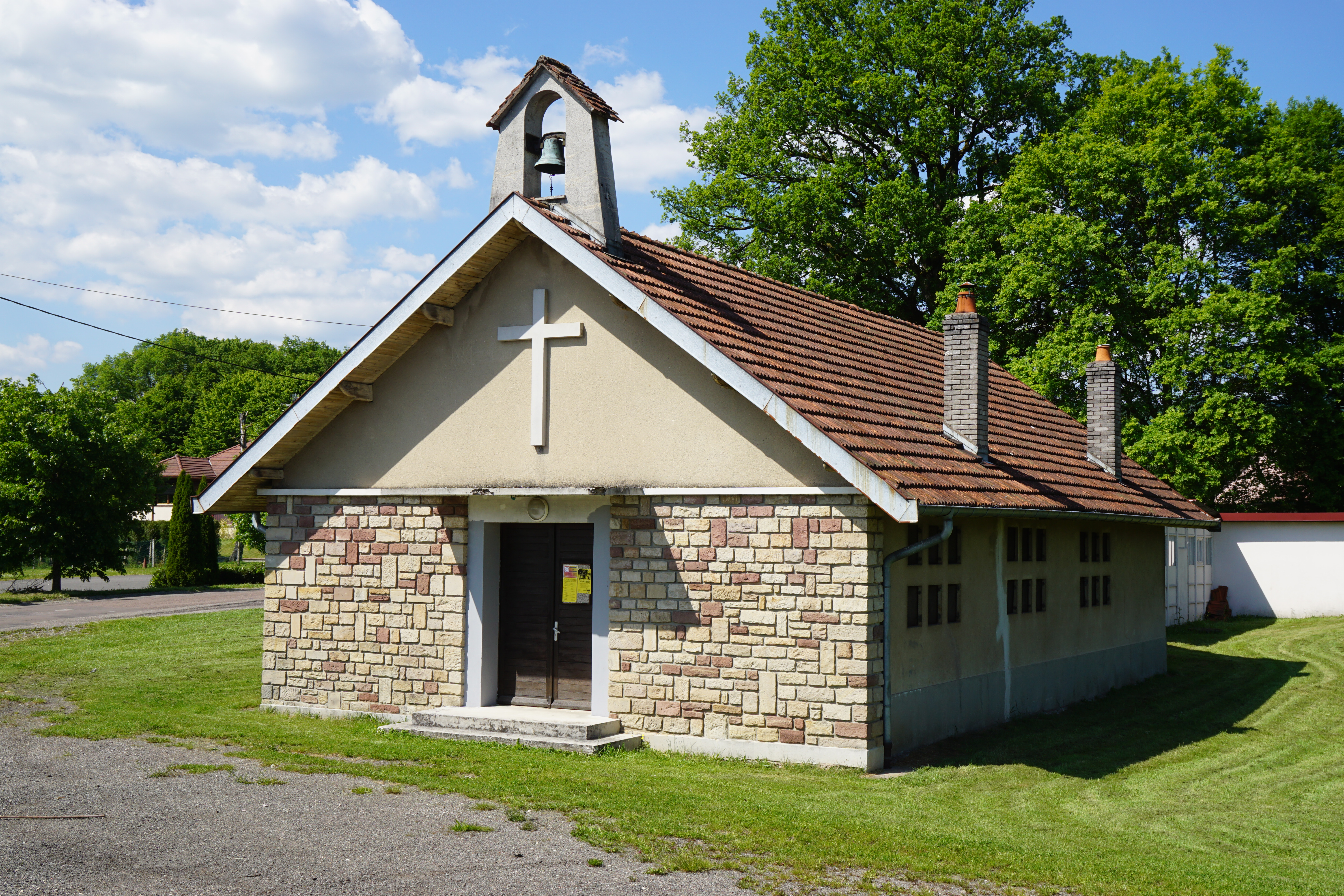 La chapelle Sainte-Pauline, vers la cité des Epoisses du puits Sainte-Pauline.